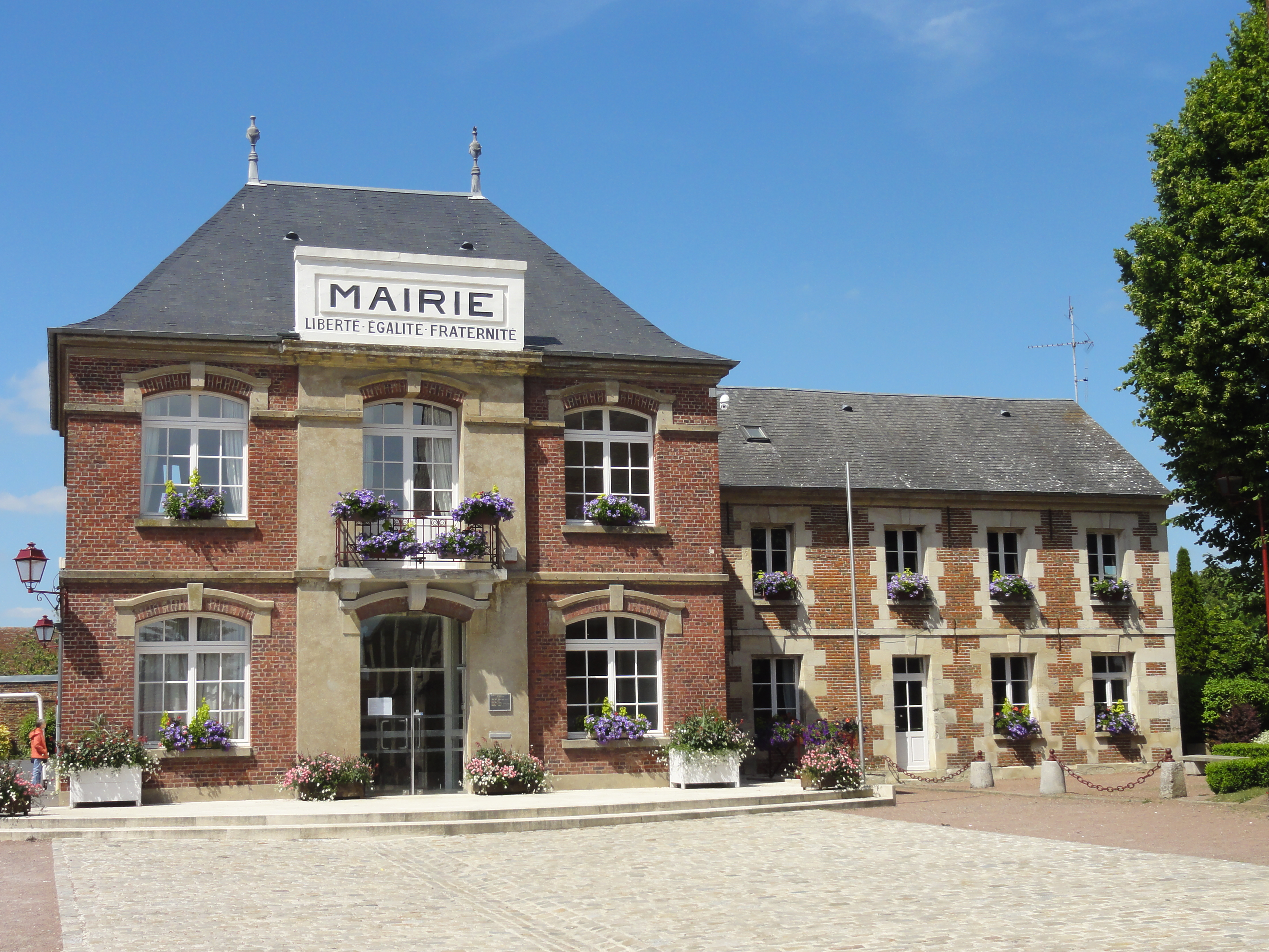 La mairie de Chevrières, place René Langlois-Meurinne.